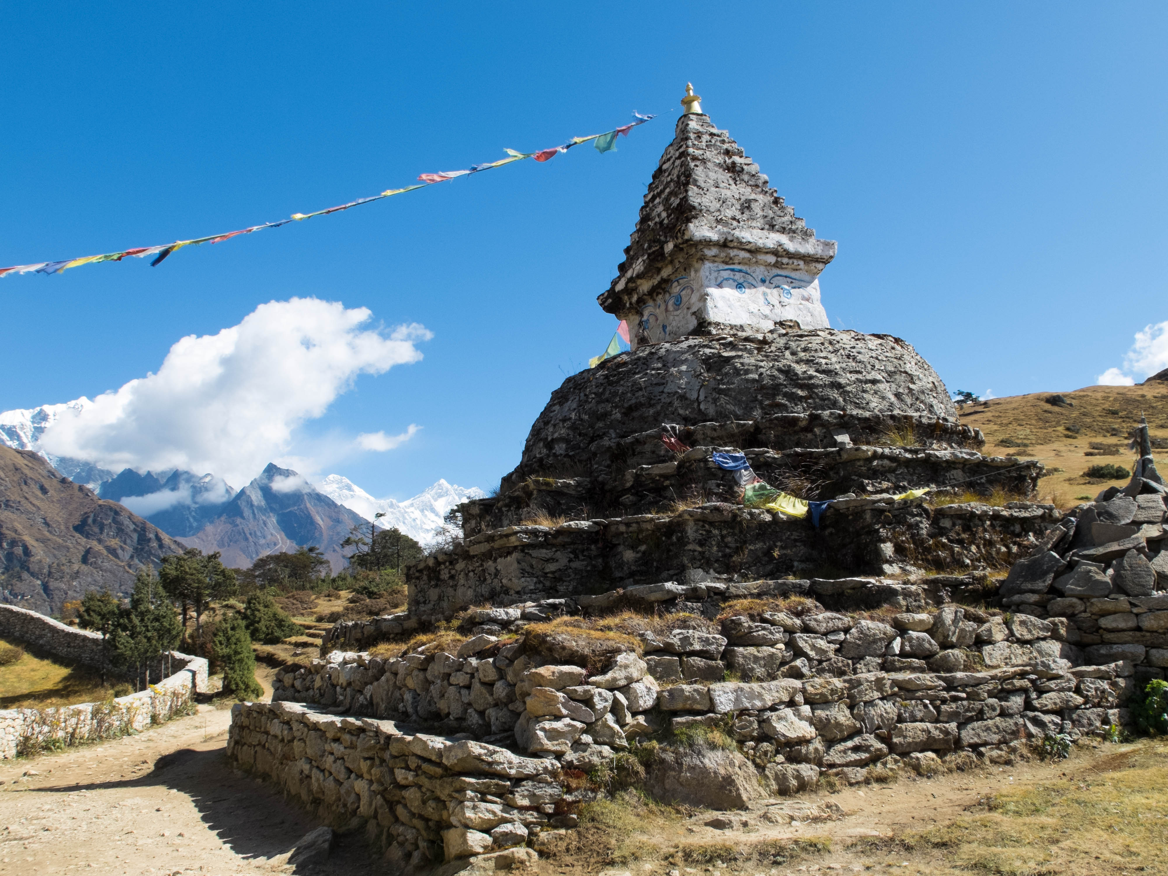 Estupa Budista en la zona de Sagarmatha.